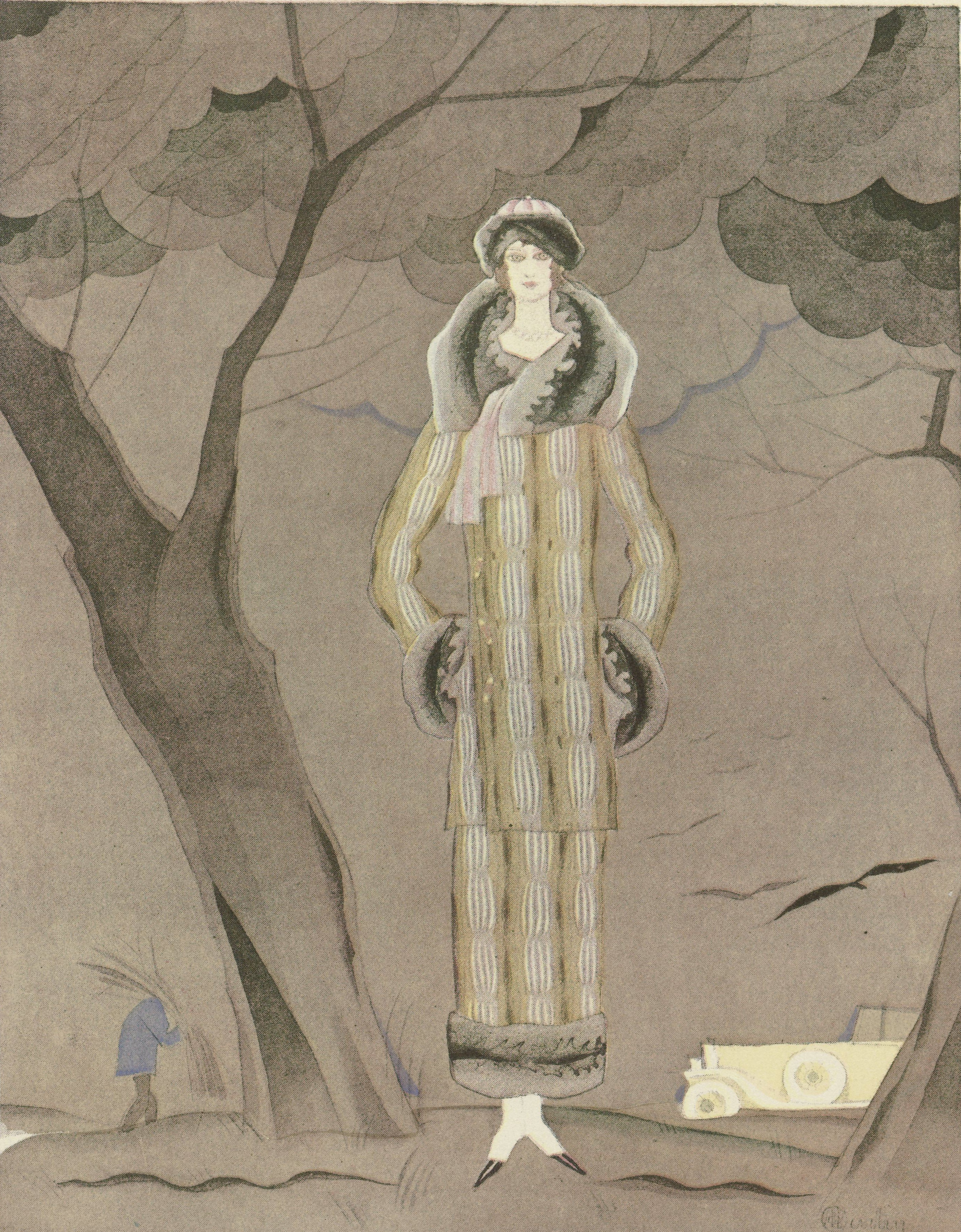 IdentificatieTitel(s): Gazette du Bon Ton. Art- Modes & Frivolités, 1924 - No. 6 : L'hiver / Tailleur en fourrure, de Max-LeroyObjecttype: modeprent Objectnummer: RP-P-2009-1970-3Opschriften / Merken: onderschrift, midden onder, boekdruk: ‘Modèle déposé. Reproduction interdite.’Omschrijving: Staande vrouw in een landschap, gekleed in een mantelpak van bont, van Max-Leroy. Op het hoofd een muts. Op de achtergrond een auto. Planche 27 uit Gazette du Bon Ton 1924, No. 6.VervaardigingVervaardiger: naar ontwerp van: Charles Martin (vermeld op object)prentmaker: anoniemmodeontwerper: Max. A. Leroy (vermeld op object)uitgever: Lucien Vogeldrukker: Imprimerie StudiumPlaats vervaardiging: ParijsDatering: 1924Fysieke kenmerken: fotomechanische kleurendruk, met de hand gekleurd en tekst in boekdrukMateriaal: papier Techniek: boekdruk / fotomechanisch procedé / kleurendruk / met de hand kleurenAfmetingen: blad: h 244 mm × b 192 mmOnderwerpWat: fashion plateshead-gear: cap (+ fur used for clothes)head-gear: cap (+ women's clothes)clothing for the upper part of the body (+ fur used for clothes)skirt (+ fur used for clothes)automobilenecklace (+ women's clothes)ensembles of pieces of clothing (SUIT) (+ women's clothes)Wanneer: 1924 - 1924Verwerving en rechtenCredit line: Aankoop uit het F.G. Waller-FondsVerwerving: aankoop 30-sep-2009Copyright: Publiek domein